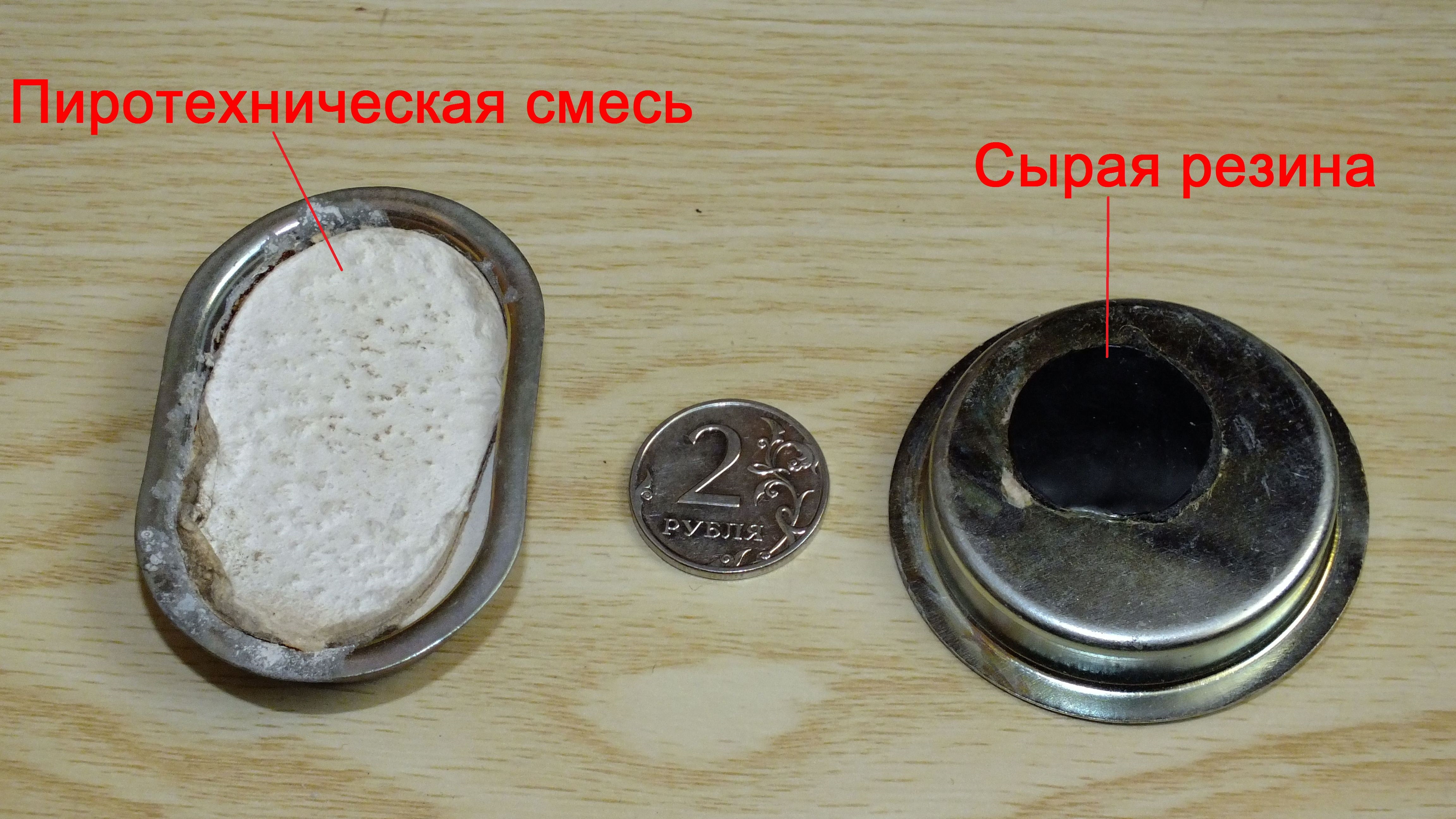 Пиротехнический вулканизатор